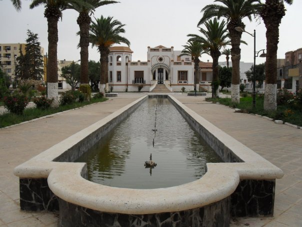 Ecole des beaux arts de sidi bel abbes,2011